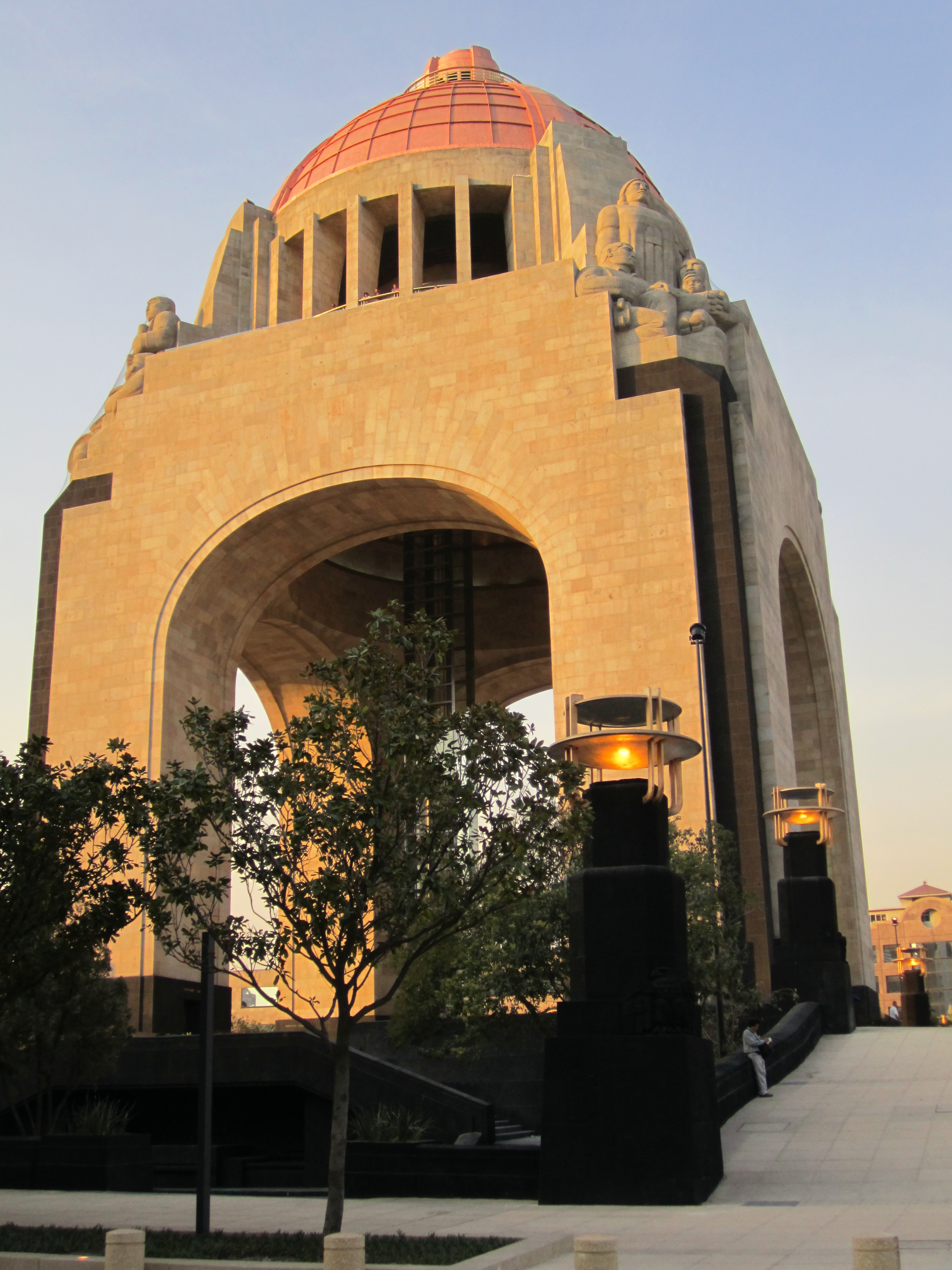 Vista del Monumento a la Revolución Mexicana desde la Plaza de la República